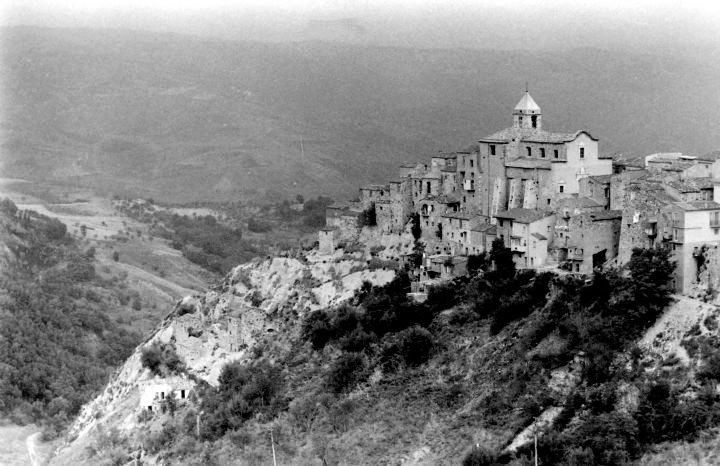 Foto storica di Castellino del Biferno